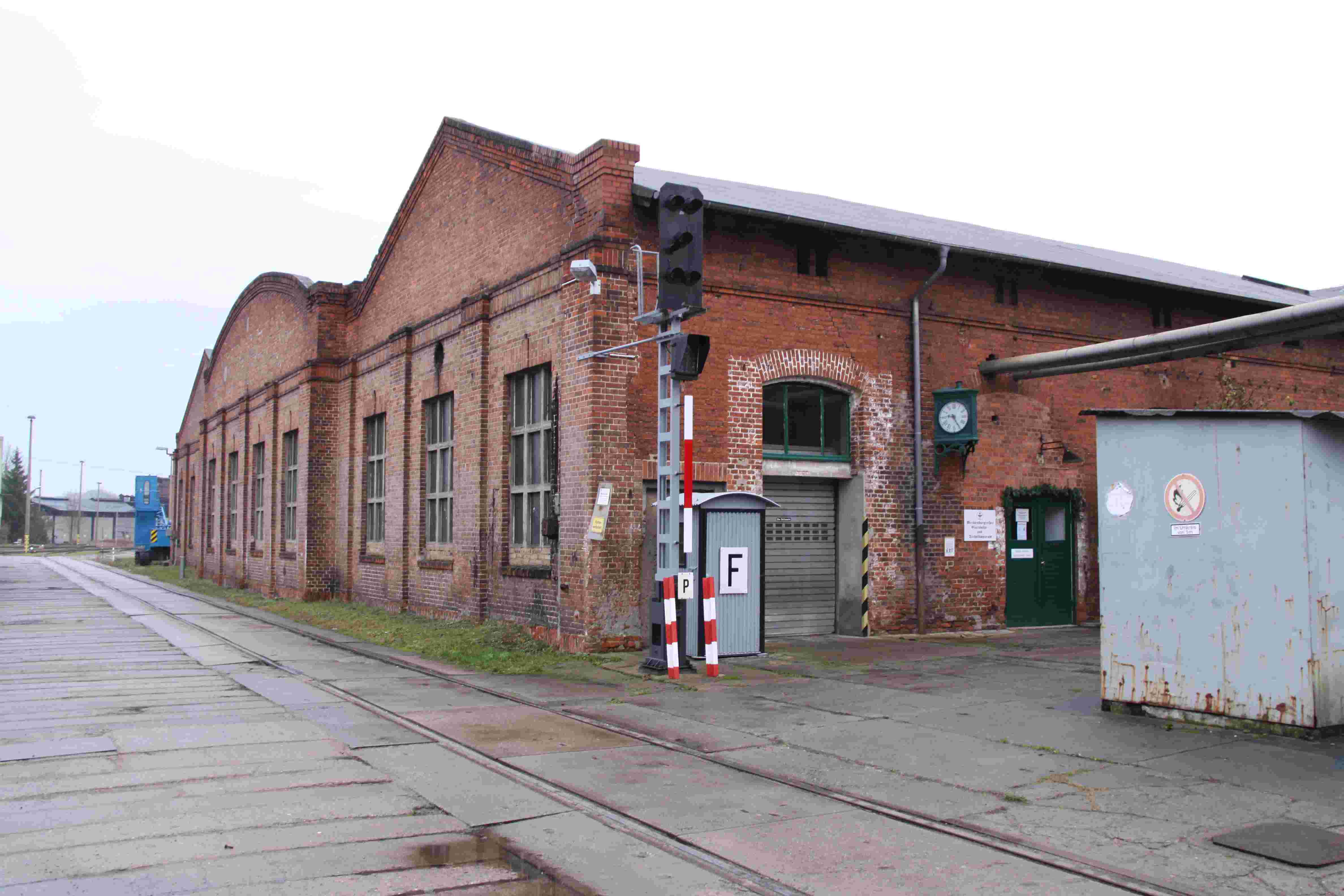 Bw Schwerin